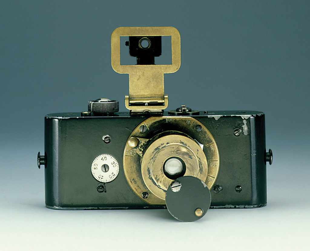 Die erste Kleinbildkamera der Welt, die Ur-Leica, von 1914